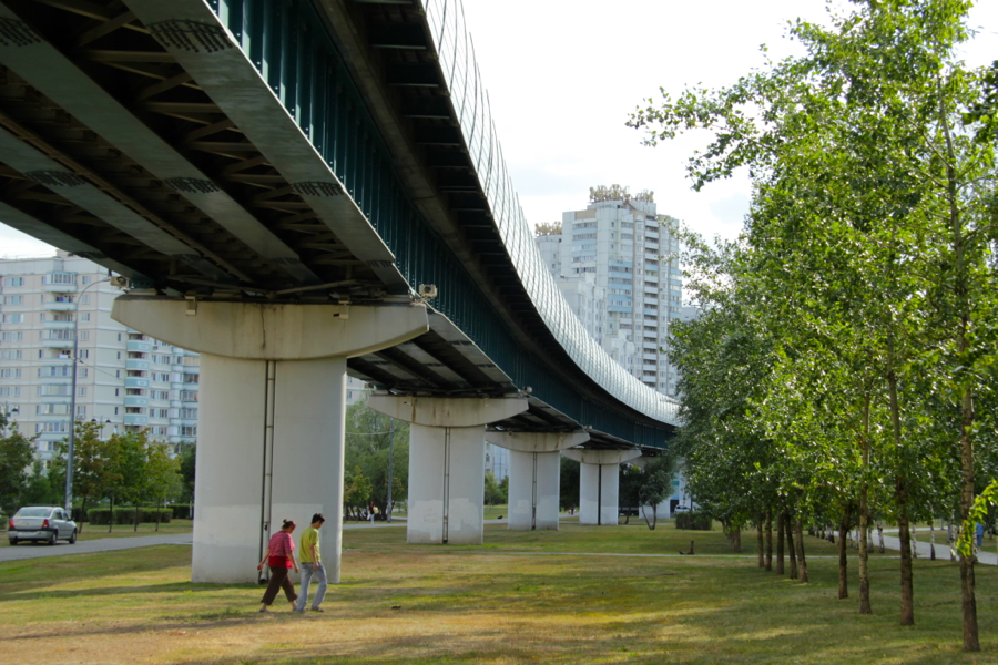 Moscow Metro (Московский метрополитен) Butovskaya Line of Light Metro (Бутовская линия лёгкого метро)